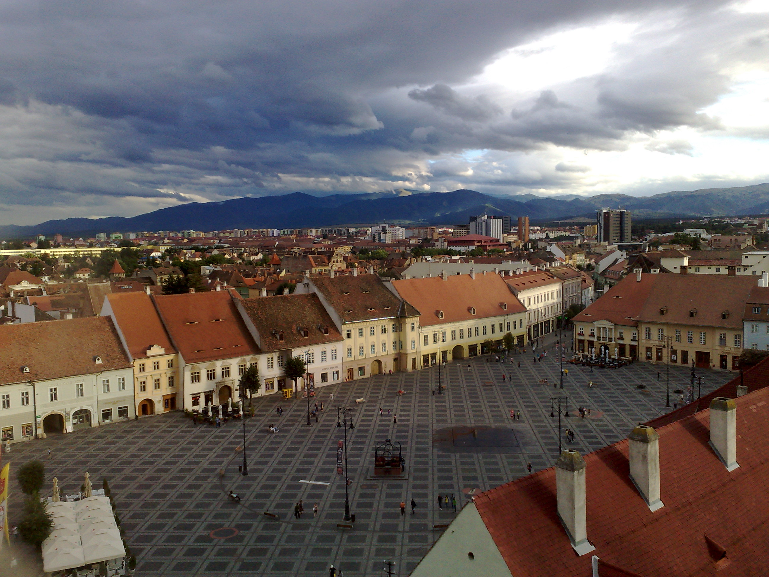 Centrul Istoric Sibiu - Piata mare din Sibiu